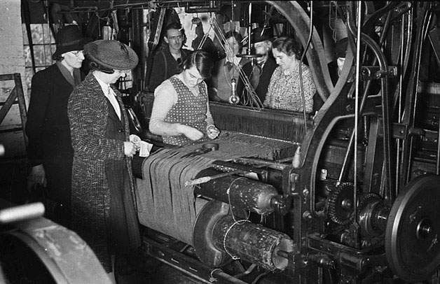 Teitl Cymraeg/Welsh title: Cynhyrchu brethyn gwlan ym Melin Teulu Leach, Mochdre Ffotograffydd/Photographer: Geoff Charles (1909-2002) Nodyn/Note: Image shows worker weaving tweed at the loom at Montgomeryshire's last tweed mill. Dyddiad/Date: November 9, 1940 Cyfrwng/Medium: Negydd ffilm / Film negative Cyfeiriad/Reference: (gcc02446) Rhif cofnod / Record no.: 3472425 Rhagor o wybodaeth am gasgliad Geoff Charles yn Llyfrgell Genedlaethol Cymru Ceir mwy o ffotograffau o Gymru a'r Gororau adeg yr Ail Ryfel Byd ar wefan .uk More information about the Geoff Charles Collection at the National Library of Wales More photographs of Wales and the English border during the Second World War can be found at .uk